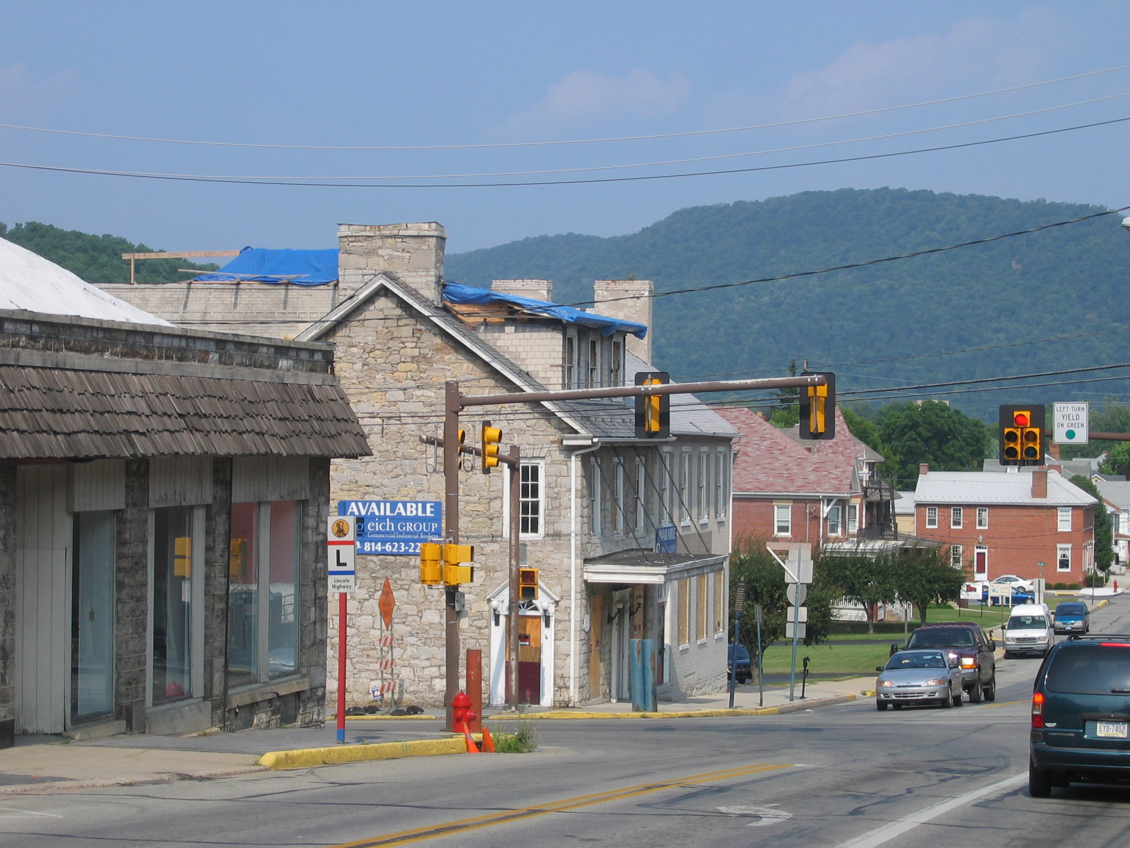 Fraser Tavern, opened in 1758, in Bedford, Pennsylvania.